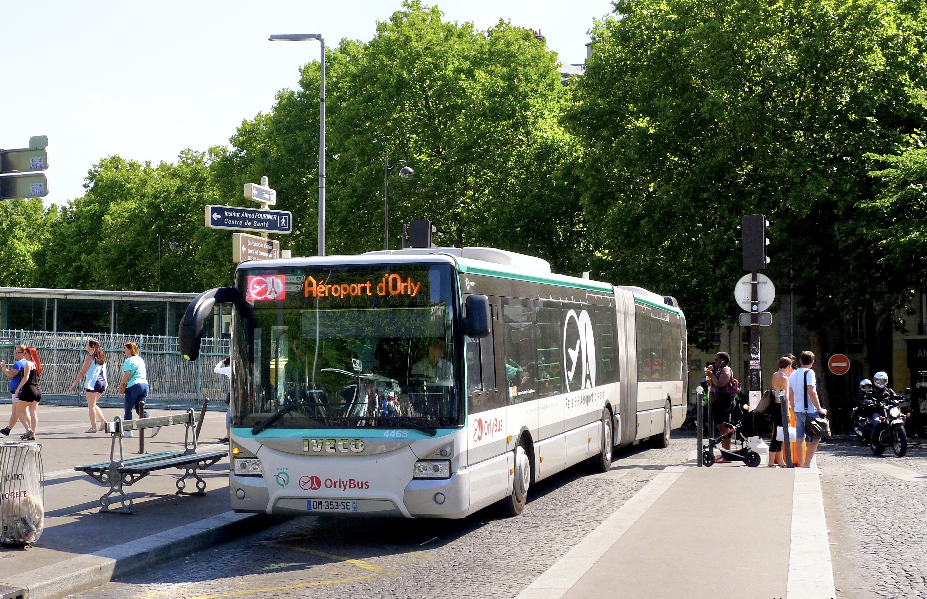 Iveco Bus Urbanway 18 n°4463 Ratp de l'Orlybus arrivant à Denfert-Rochereau.